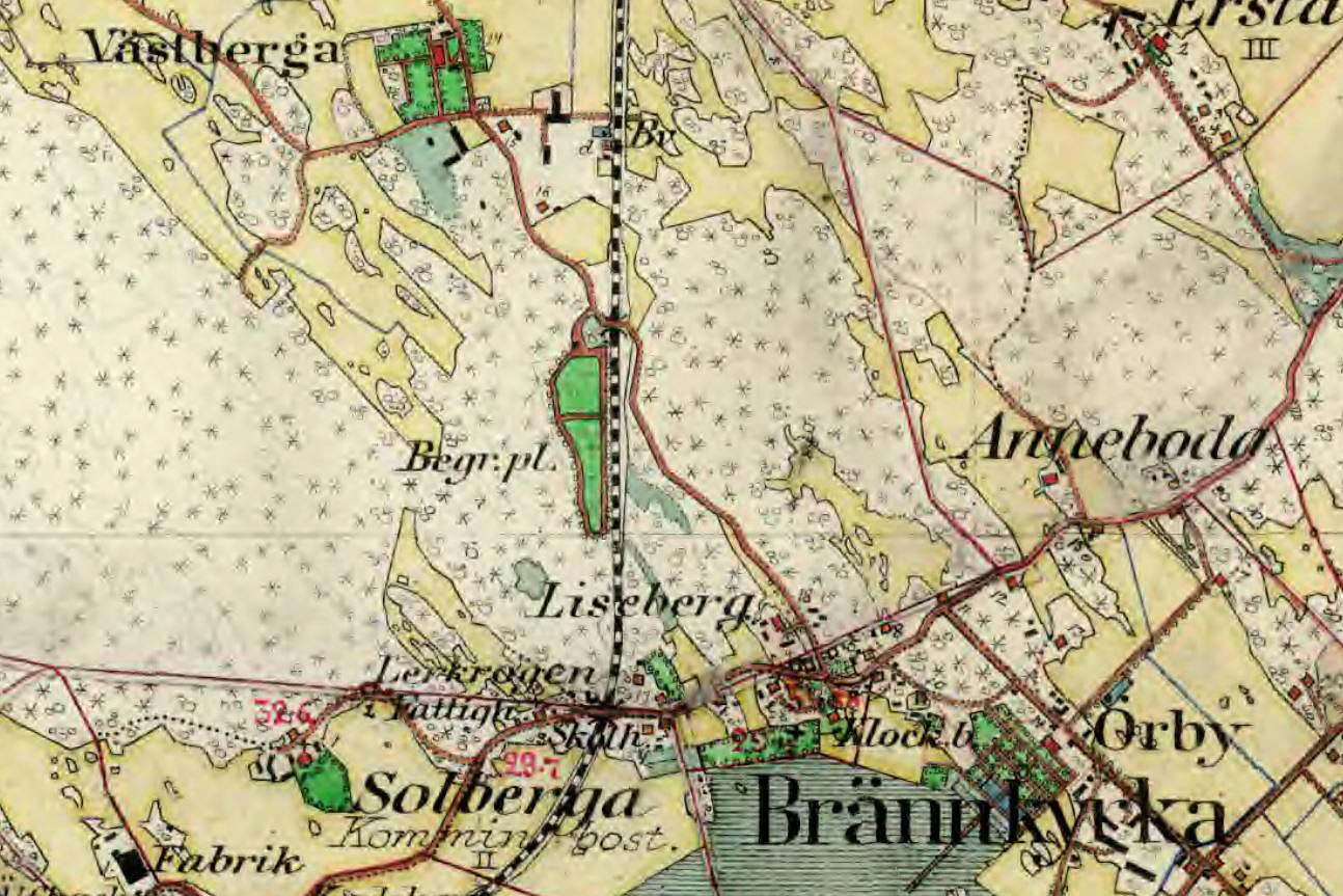 Häradskartan 1901 visande Västberga gårds ägor, Lerkrogen och Brännkyrka kyrka